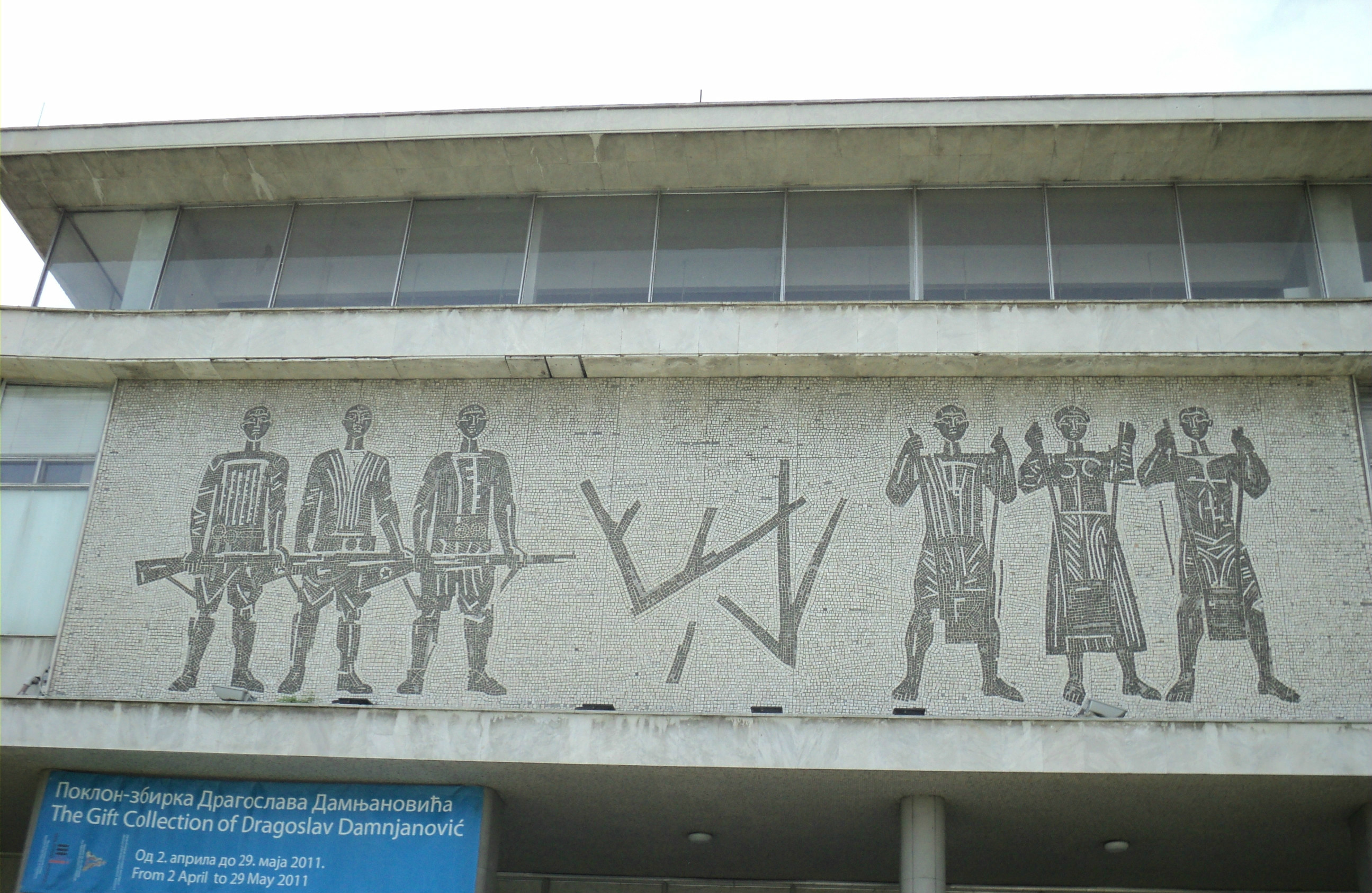 Mozaik iznad ulaza u Muzej "25. maj" u Beogradu. Self-made. Maj 2011.